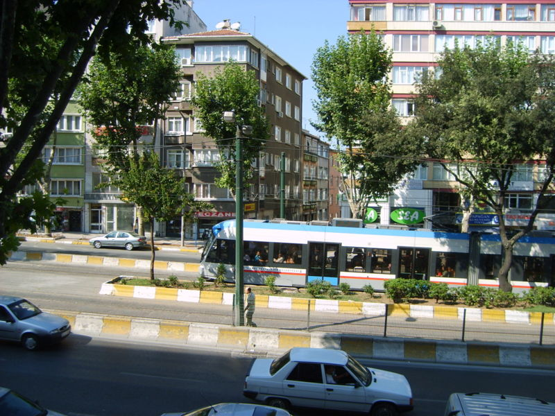 Fındıkzade, Fatih